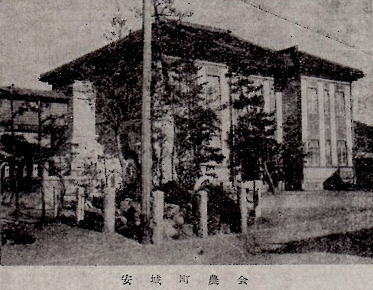 1932年の安城町農会館（現・愛知県安城市）